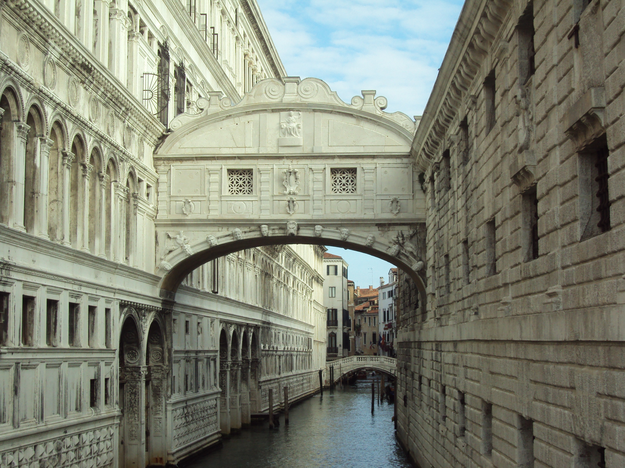 Most Westchnień w Wenecji